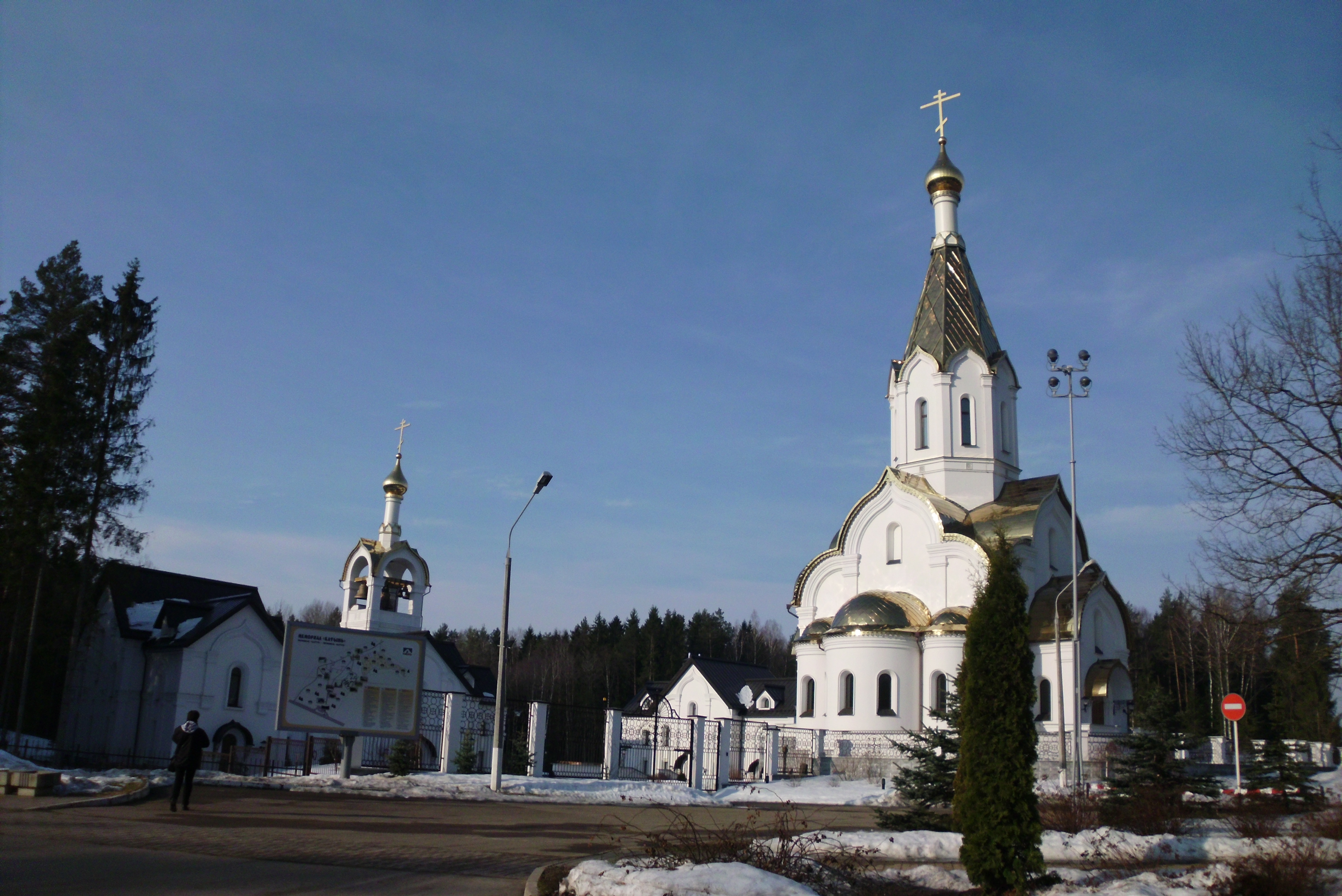 Kwiecień 2013